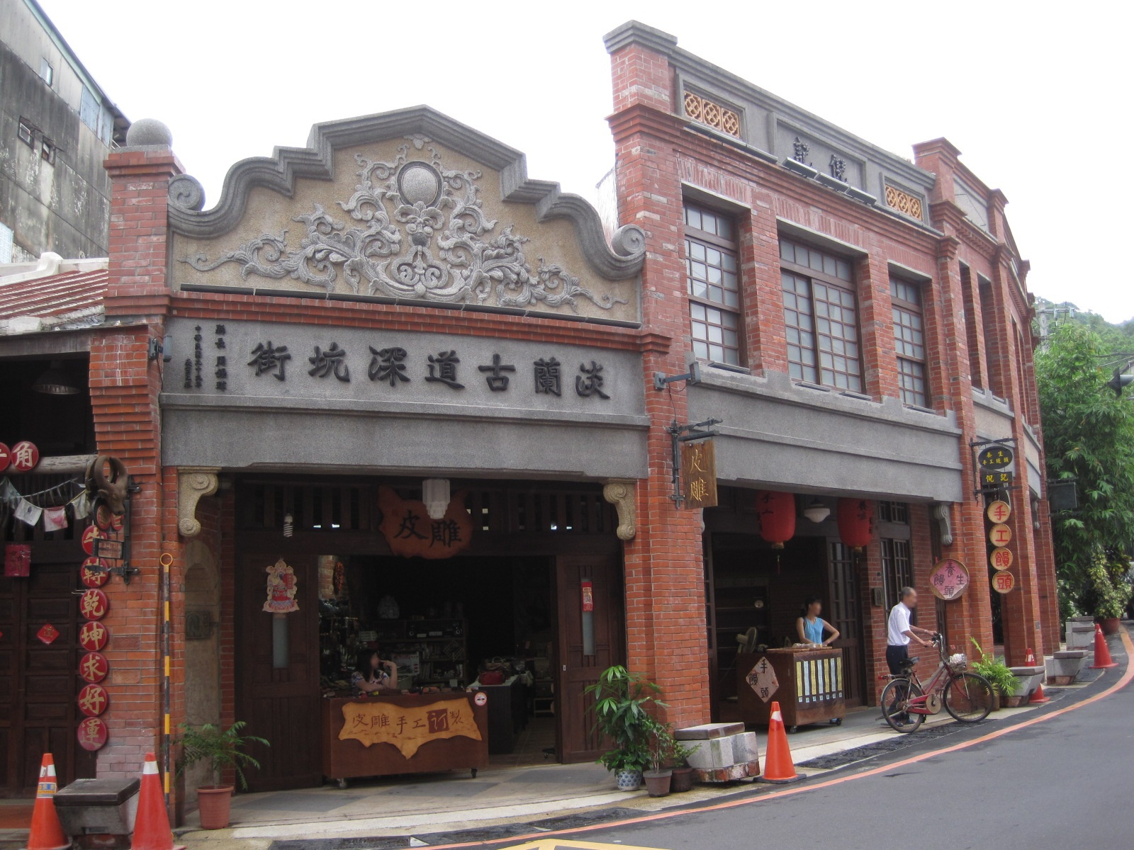 中文（台灣）: 深坑老街